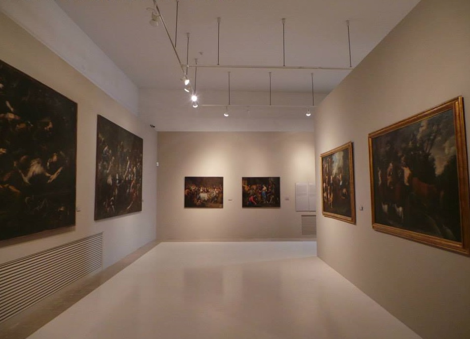 Sezione siecentesca museo diocesano